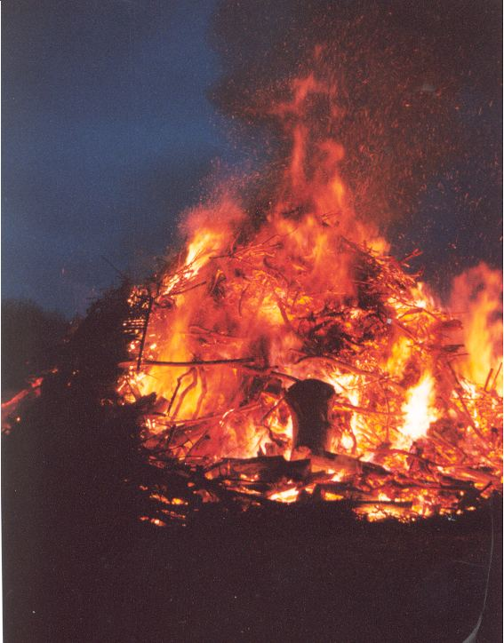 Paasvuur te Onstwedde op 2e paasdag 2004, eigen foto